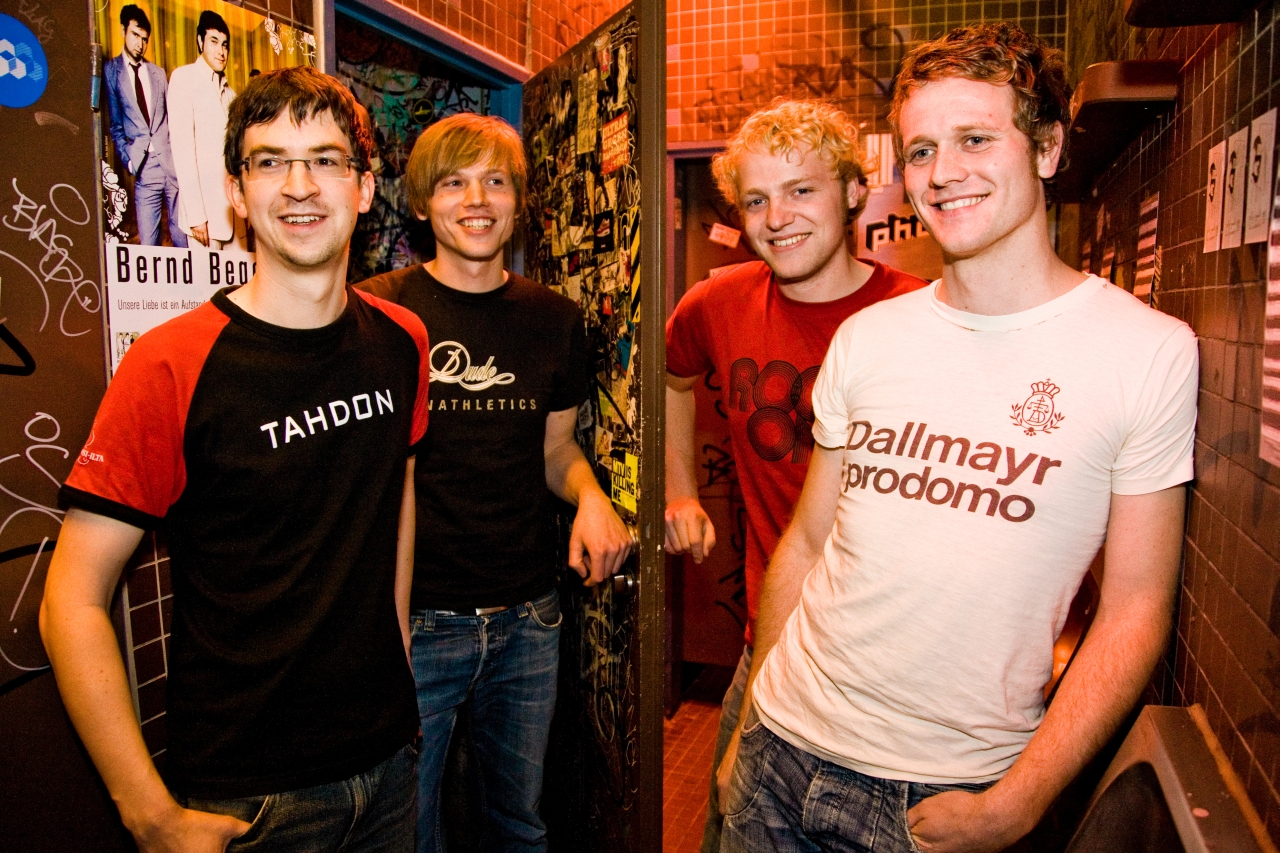 Bernd Braun, Andreas Scheerer, Josua Scheerer, Florian Laske